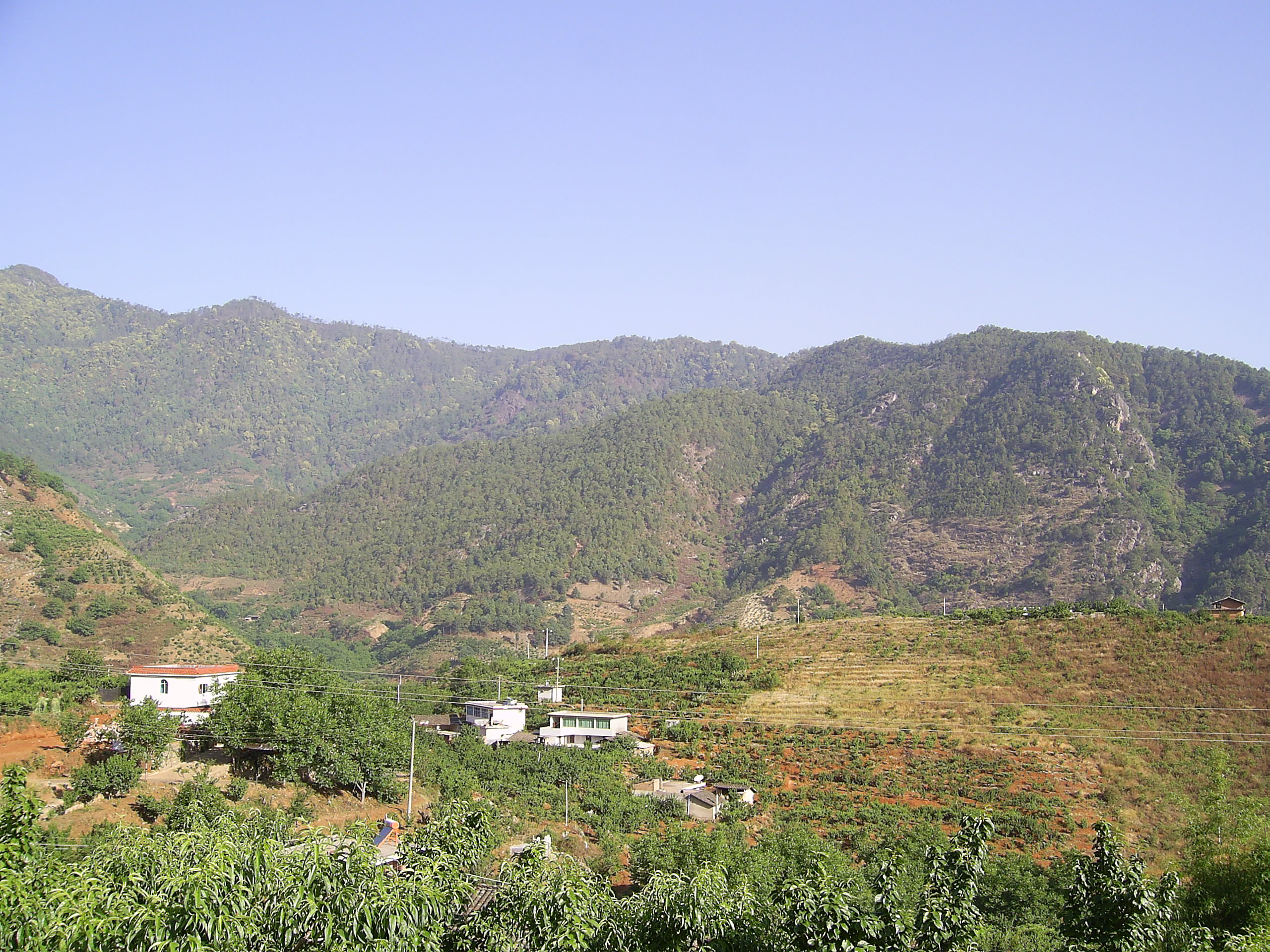 攀枝花乌拉村